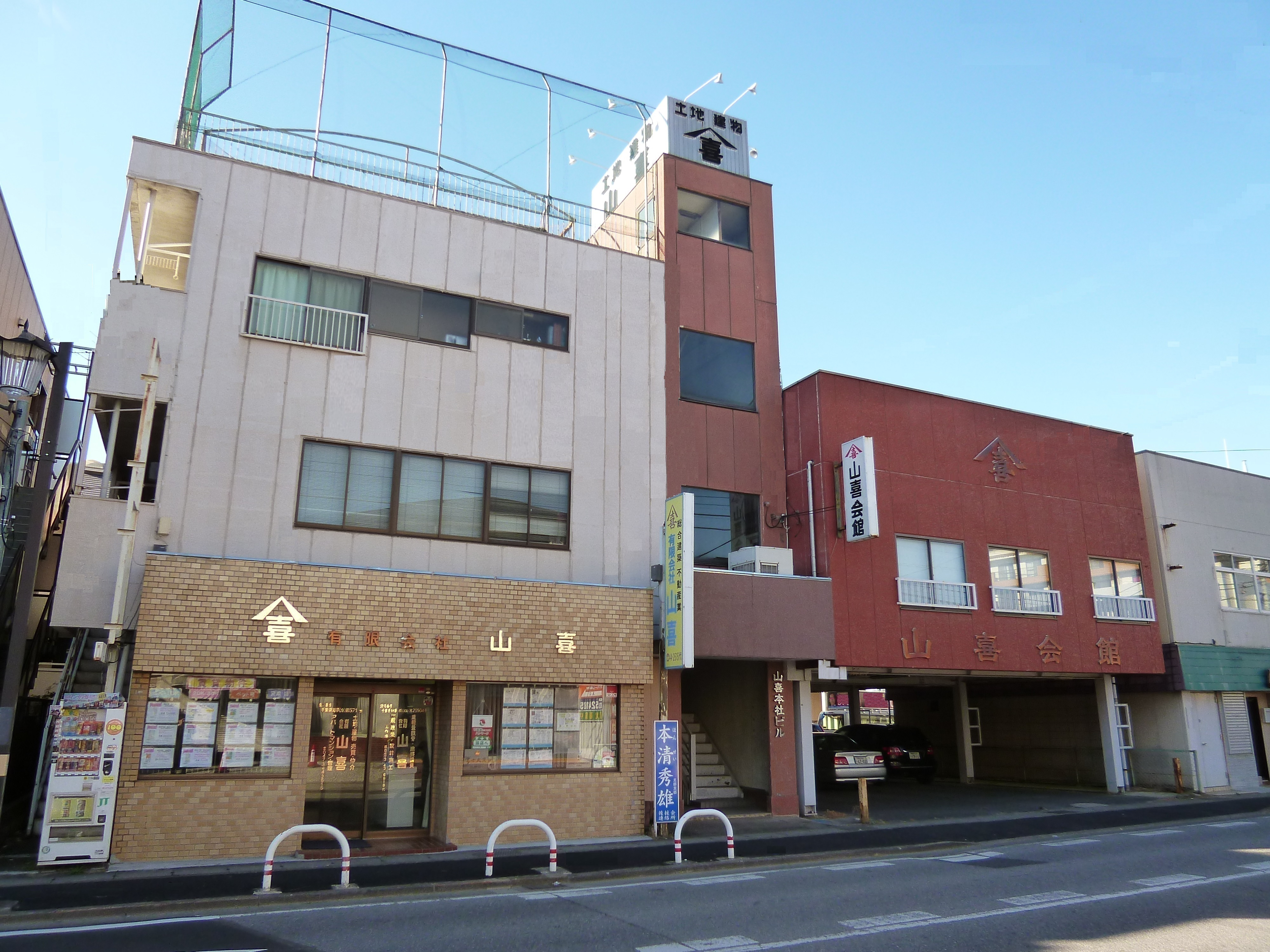 山喜本社ビル